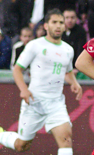 Algérie-Roumanie - 20140604 - Abdelmoumene Djabou